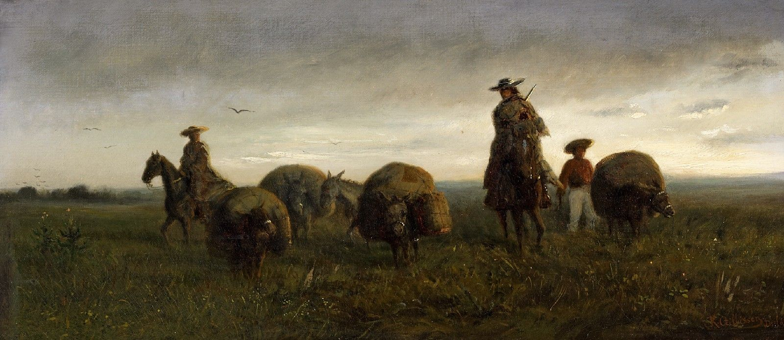 Reiter mit Maultieren in mexikanischer Prärielandschaft. Signiert unten rechts: K. Gillissen Dssldf. Öl auf Leinwand. 25,5 x 58 cm.